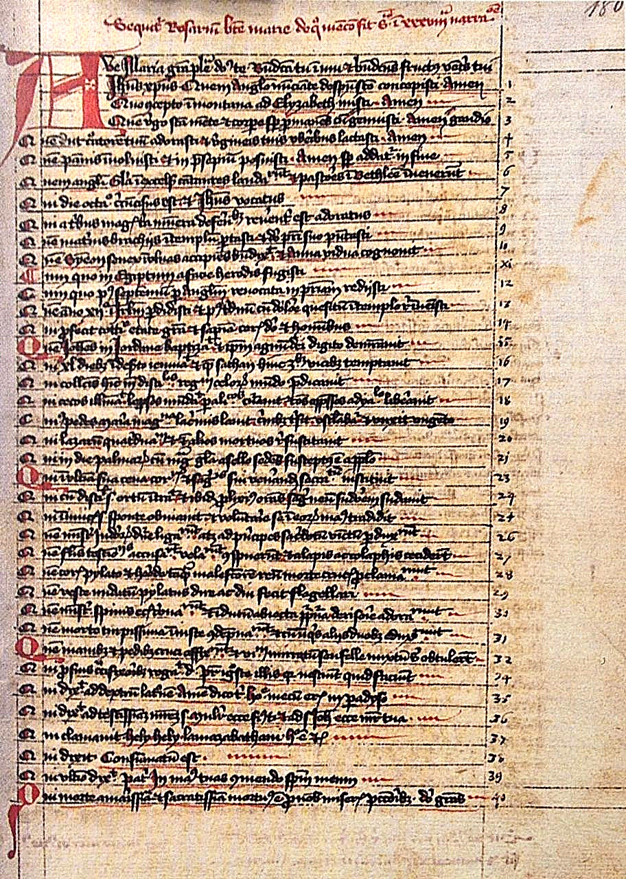 Manuscript, Stadtbibliothek Trier: Die Rosenkranz-Clausulae des Dominikus von Preussen (+ 1460)